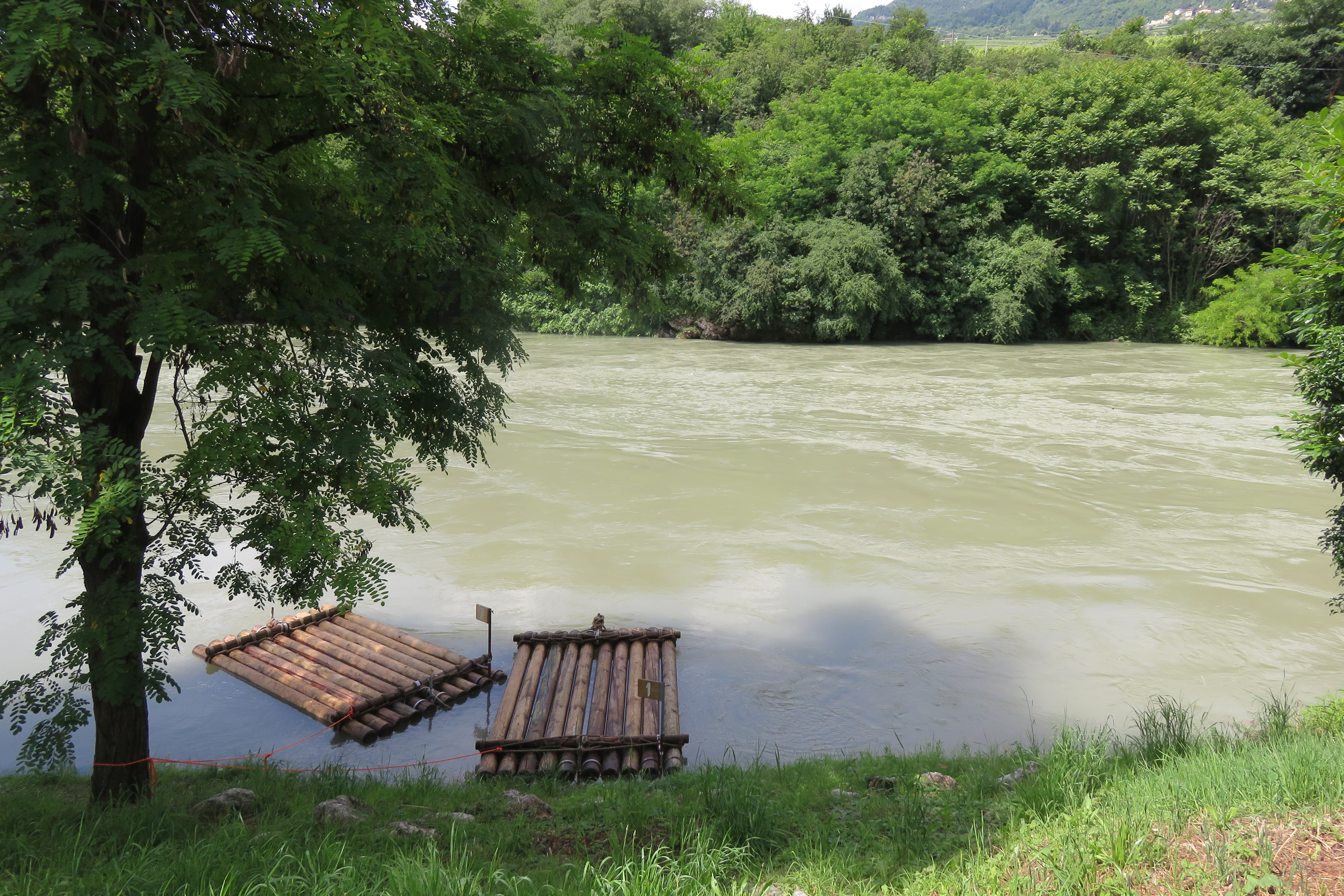 il fiume adige con due zattere pochi giorni dopo la maifestazione del 2016